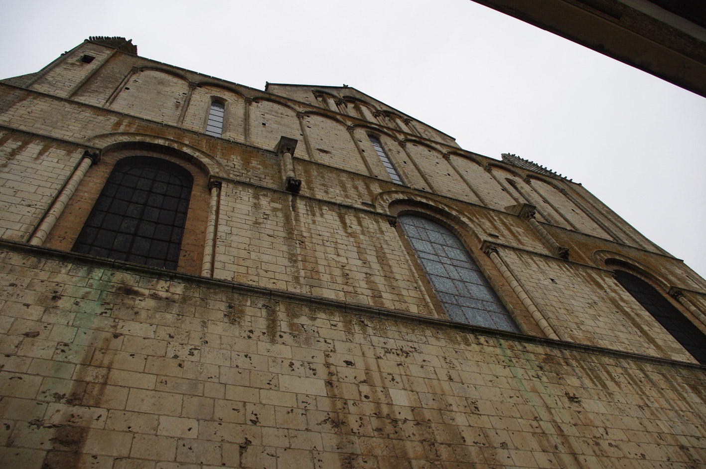 Mur chevet de la cathédrale Saint-Pierre de Poitiers (XIIe et XIIIe s)